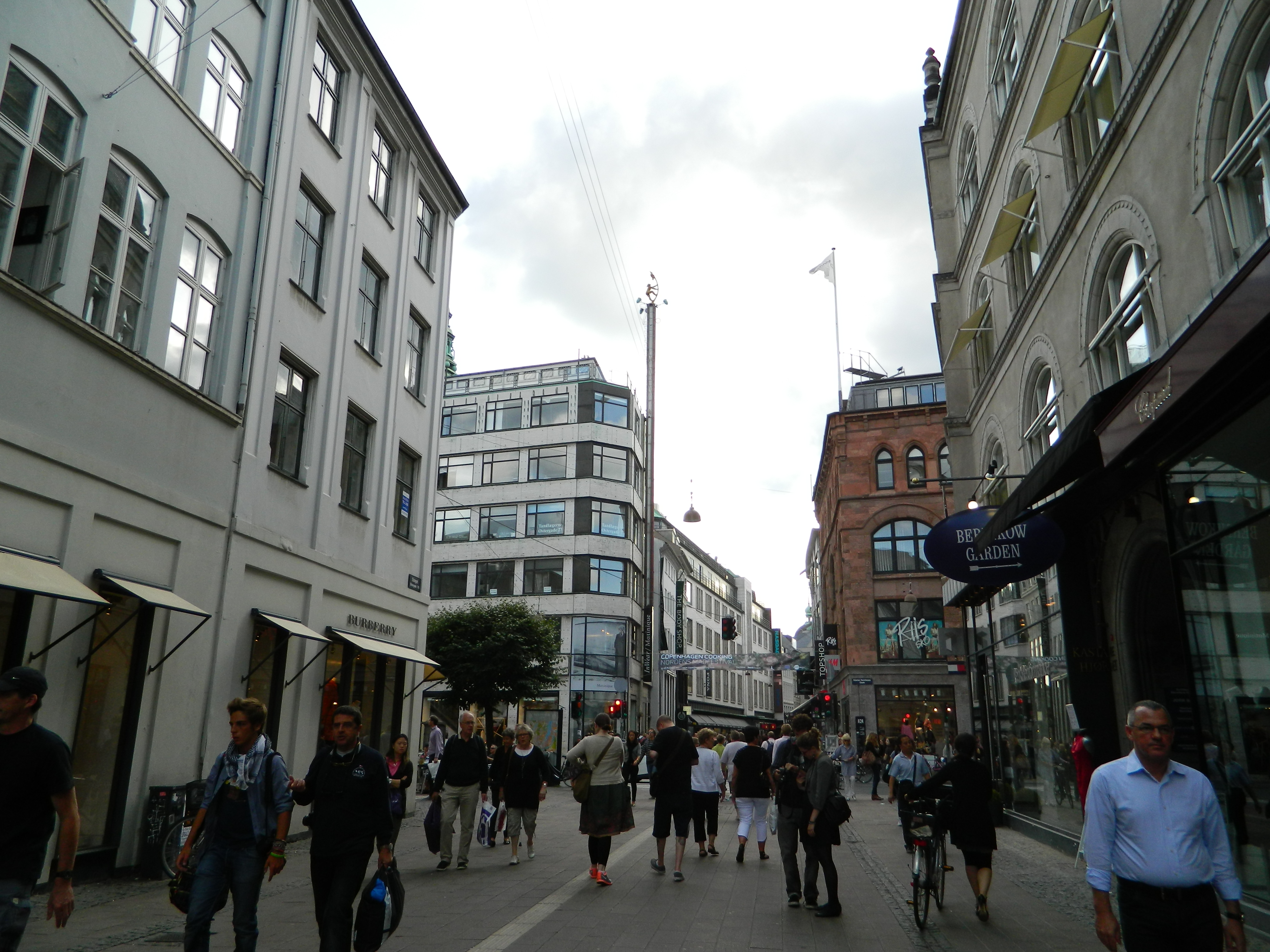 Copenhagen